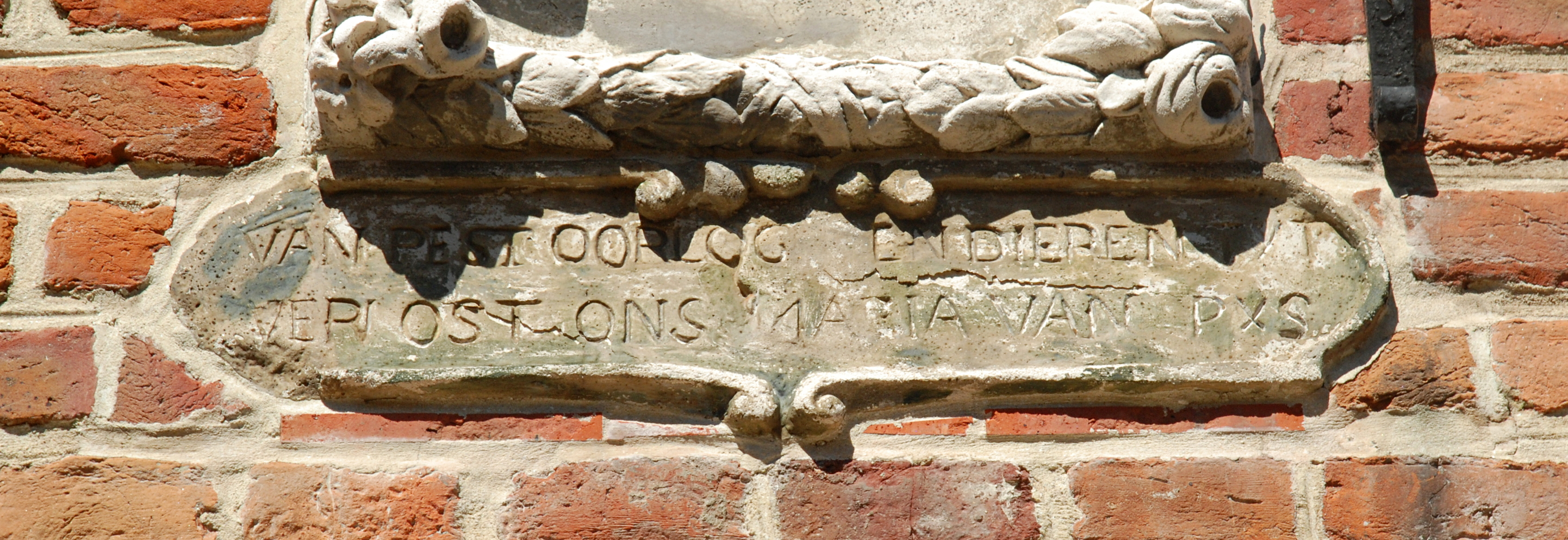 Belgium - Leuven - Groot Begijnhof - Klein Straatken n° 69 - maison « Cas van Waver »